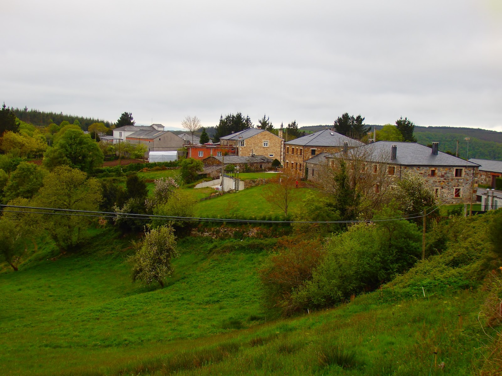 Ver título